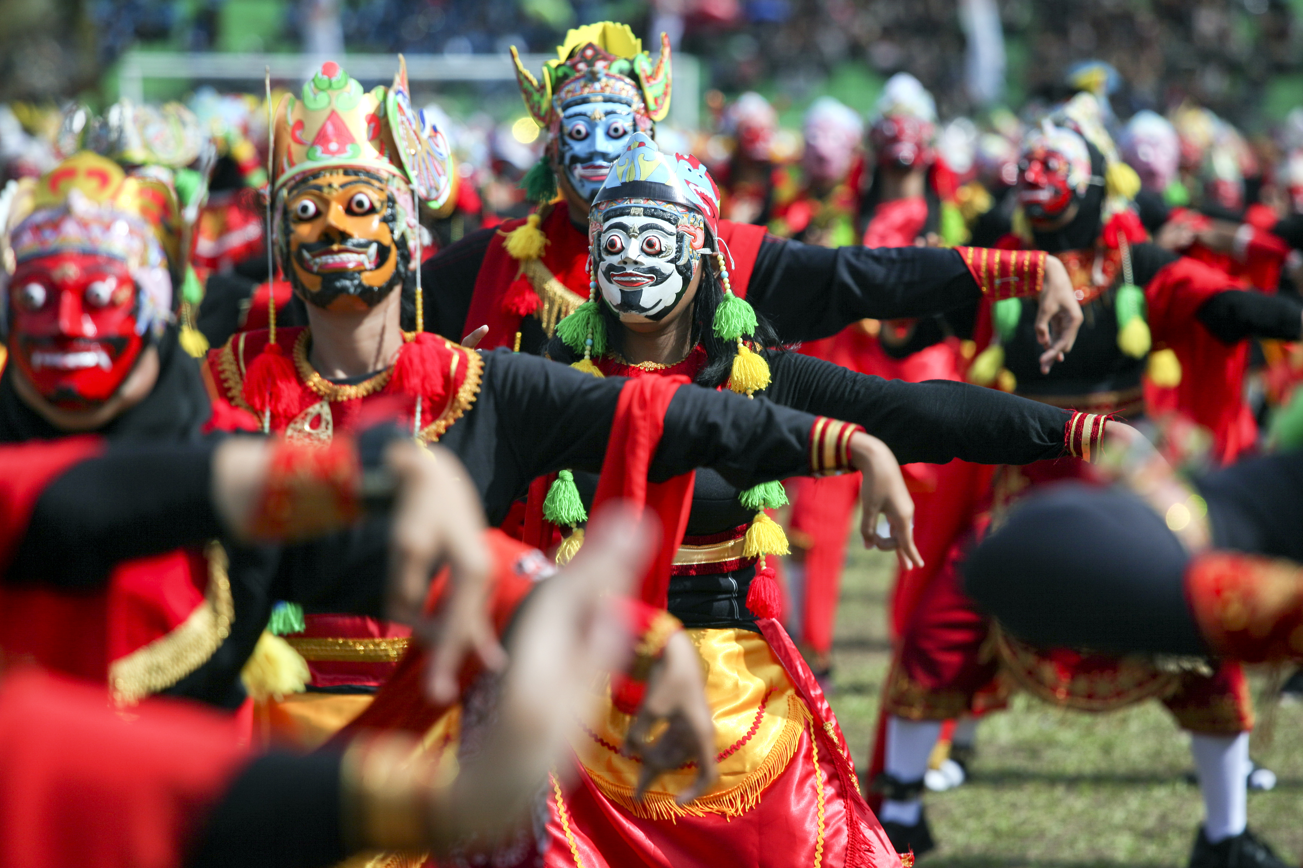 Sejumlah pelajar menari topeng secara massal di Stadion Gajayana Kota Malang. Tari Topeng malang adalah seni khas Kota Malang.